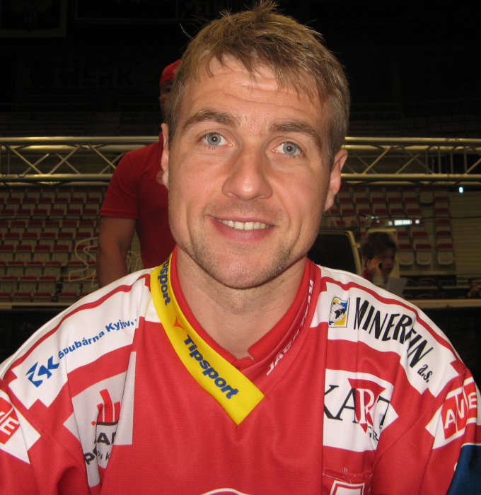 Po zakončení sezóny 2014/15 ve Werk Areně